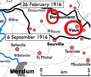 Dispositif de défense au nord-nord-est de Verdun montrant la position du fort de Vaux et du fort de Douaumont. Les lignes noires indiquent les positions allemandes lors de la bataille de Verdun en 1916.